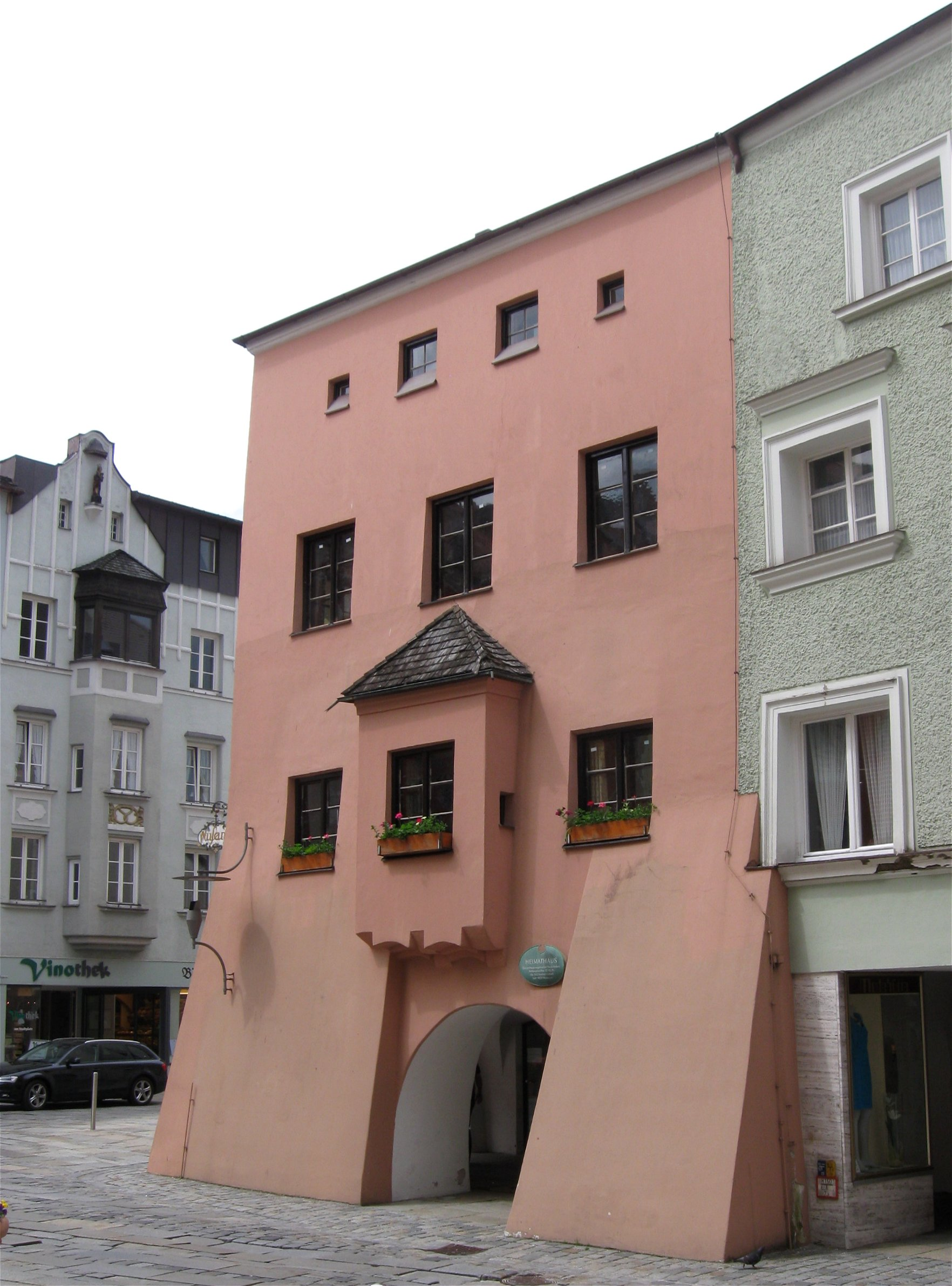 Stadtplatz 2; Stadtplatz 3; ehemaliges Zieglerwirtshaus, jetzt Museum im Heimathaus, mit Erdgeschosslauben und Erker, spätes 17. Jahrhundert.